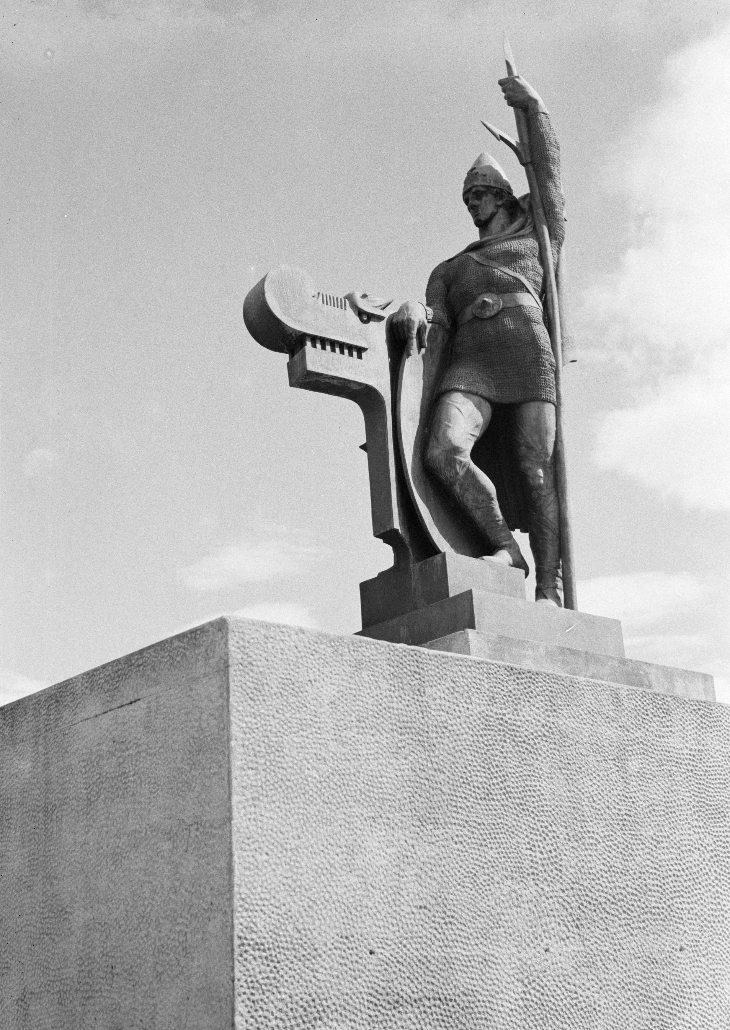 Collectie / Archief : Fotocollectie Van de Poll Reportage / Serie : IJsland Beschrijving : Reykjavik. Standbeeld van Ingolfur Arnarsson Annotatie : Ingolfur Arnarsson was een Noors stamhoofd die zich als eerste permanent op IJsland vestigde omstreeks 880 n. Chr. Datum : 1934 Locatie : IJsland, Reykjavik Trefwoorden : beeldhouwkunst, geschiedenis, standbeelden Persoonsnaam : Arnarsson, Ingolfur Fotograaf : Poll, Willem van de, [onbekend] Auteursrechthebbende : Nationaal Archief Materiaalsoort : Glasnegatief Nummer archiefinventaris : bekijk toegang 2.24.14.02 Bestanddeelnummer : 190-0400